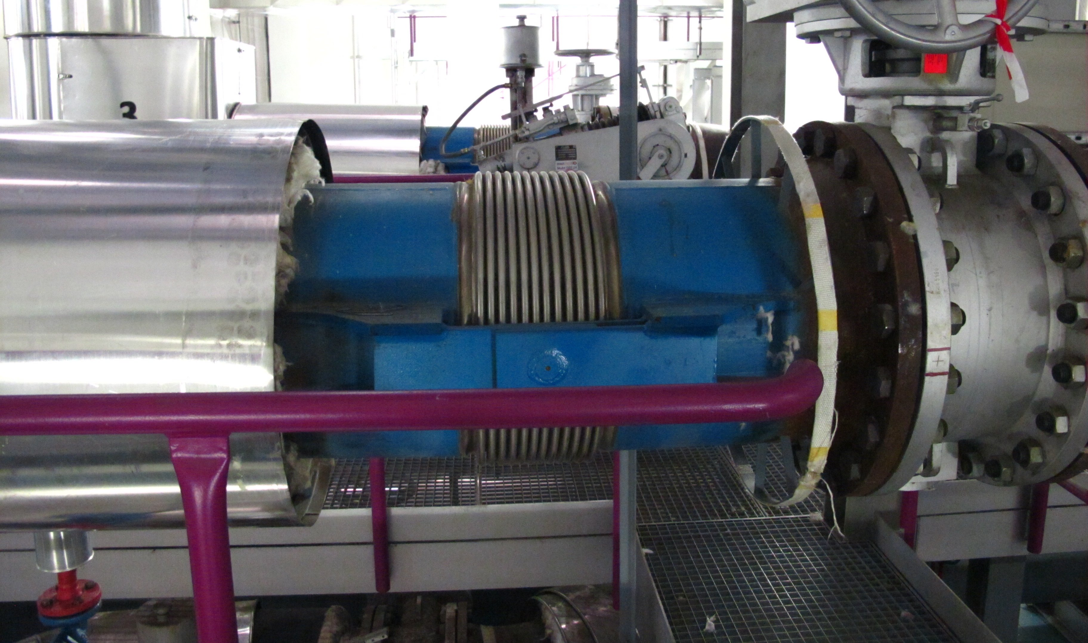 Gelenkkompensator um thermisch bedingte Drehbewegungen an der Fernwärmeleitung mit einem Winkel von +/- 6,5° kompensieren zu können. Im Fernheizwerk Inzersdorf